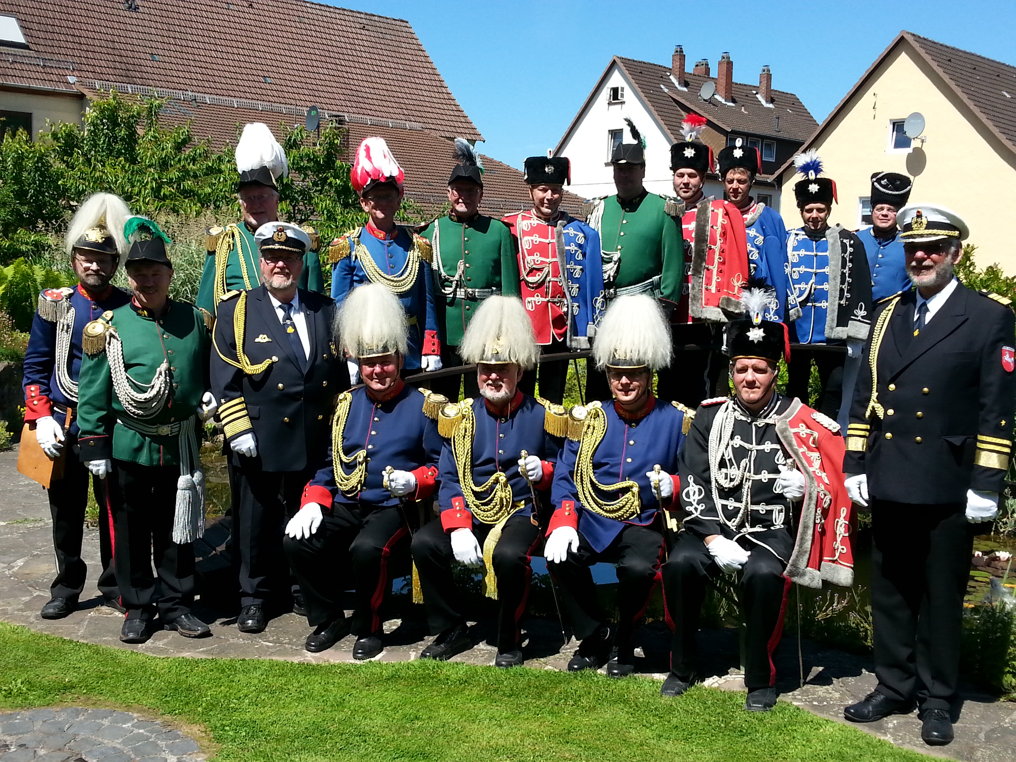 Der Stab des Bodenfelder Schüttenhoffs im Garten des Generalfeldmarschals